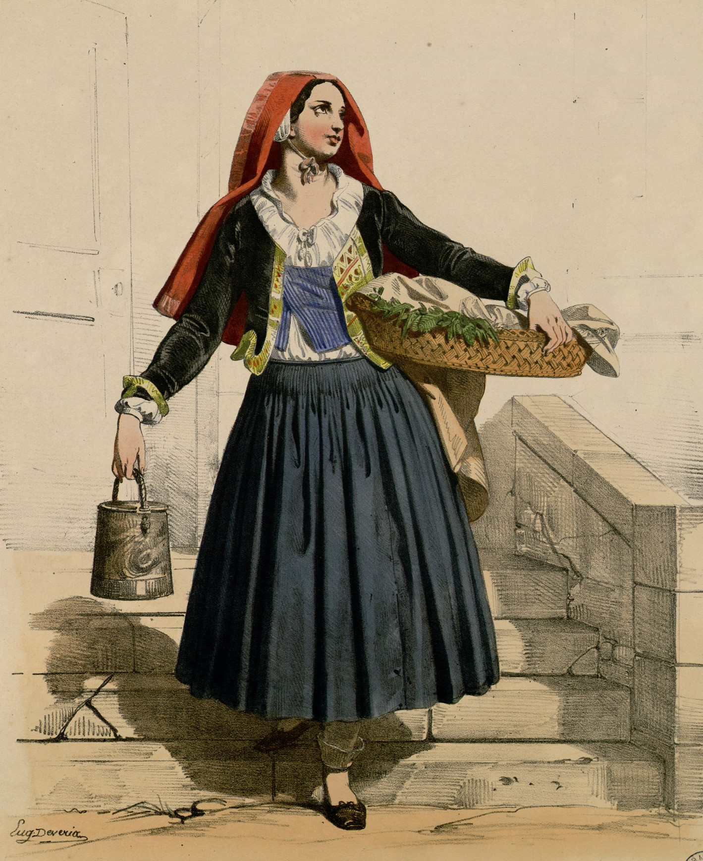 La page de titre et les 6 planches sont signées E. Devéria et sont lithographiées en couleurs et réhaussées à l'aquarelle. - Cartonnage d'éditeur papier vert sur lequel la page de titre est reproduite en noir Il existe plusieurs tirages de cet ouvrage qui comprennent au moins les six planches de costumes (en hauteur) numérotées de 1 à 6 et, selon les cas, deux ou trois planches (en largeur) non numérotées. Le premier tirage intitulé "Costumes pittoresques de la vallée d'Ossau" et lithographié par E. Vignancour est daté de 1844 ; le tirage dont il est question ici est ultérieur, sans date. On note plusieurs différences entre les différents tirages : les deux dernières planches notamment se distinguent (voir Labarère, Bibliographie pyrénéiste, 486) Dans ce tirage, les titres sont en capitales romaines maigres. La pl. 6 intitulée "Guide aux Eaux-Bonnes" porte les mentions "Chez A. Bassy, Pau" et "Lith. de E. Vignancour," au contraire des autres planches qui portent la mention "Edité et lith. par A. Bassy, à Pau" Ancely, René (1876 - 1966). Possesseur